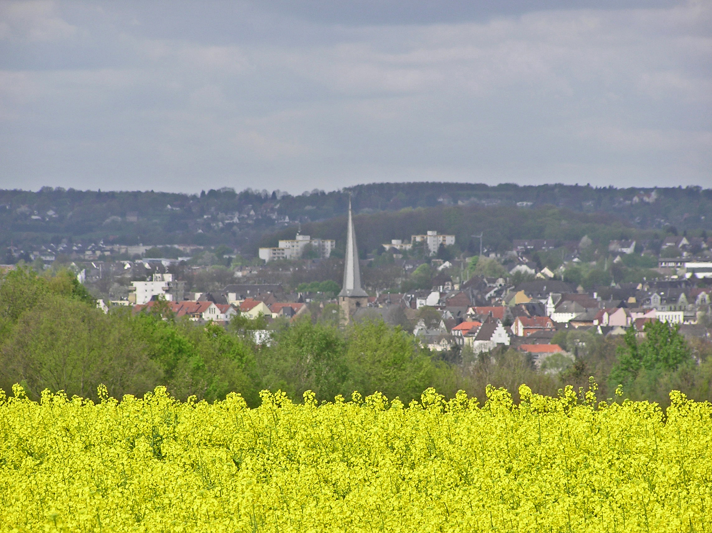 Blick vom Ohl auf Schwerte mit St. Viktor